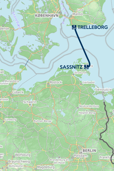 Kartenskizze Fährverbindung Sassnitz-Trelleborg